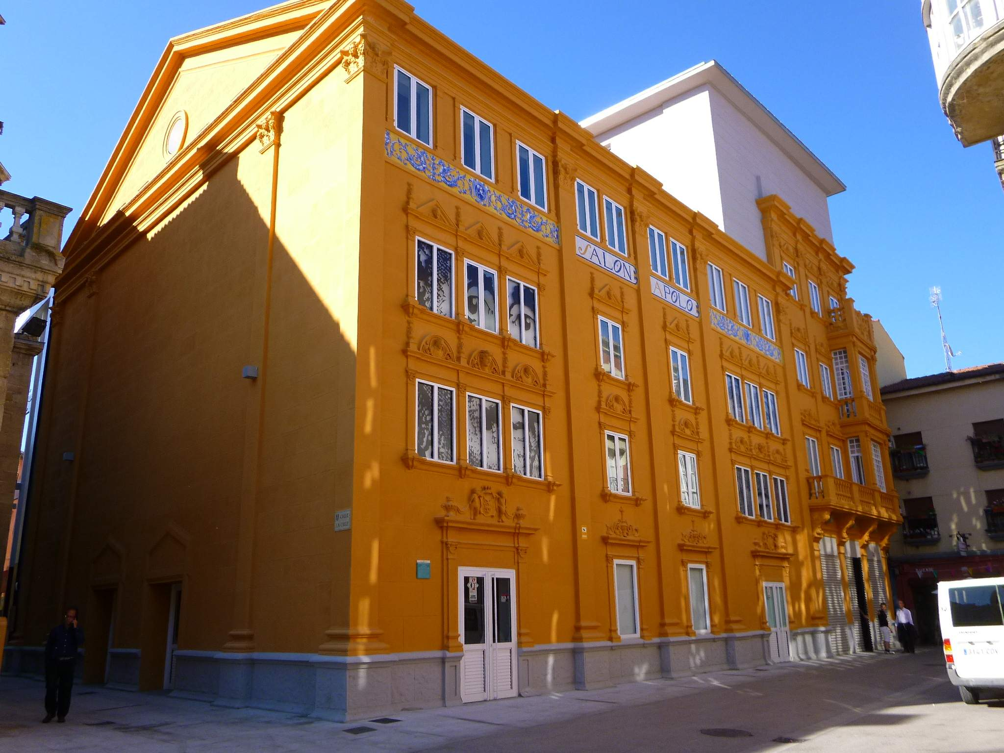 Miranda de Ebro - Teatro Apolo